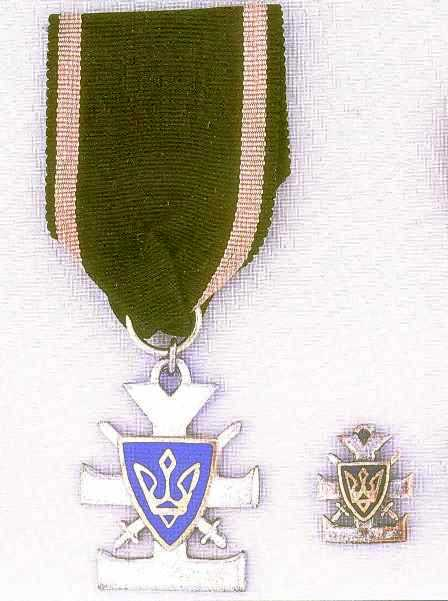 Бойовий Хрест Українських Січових Стрільців (Мазепинський).